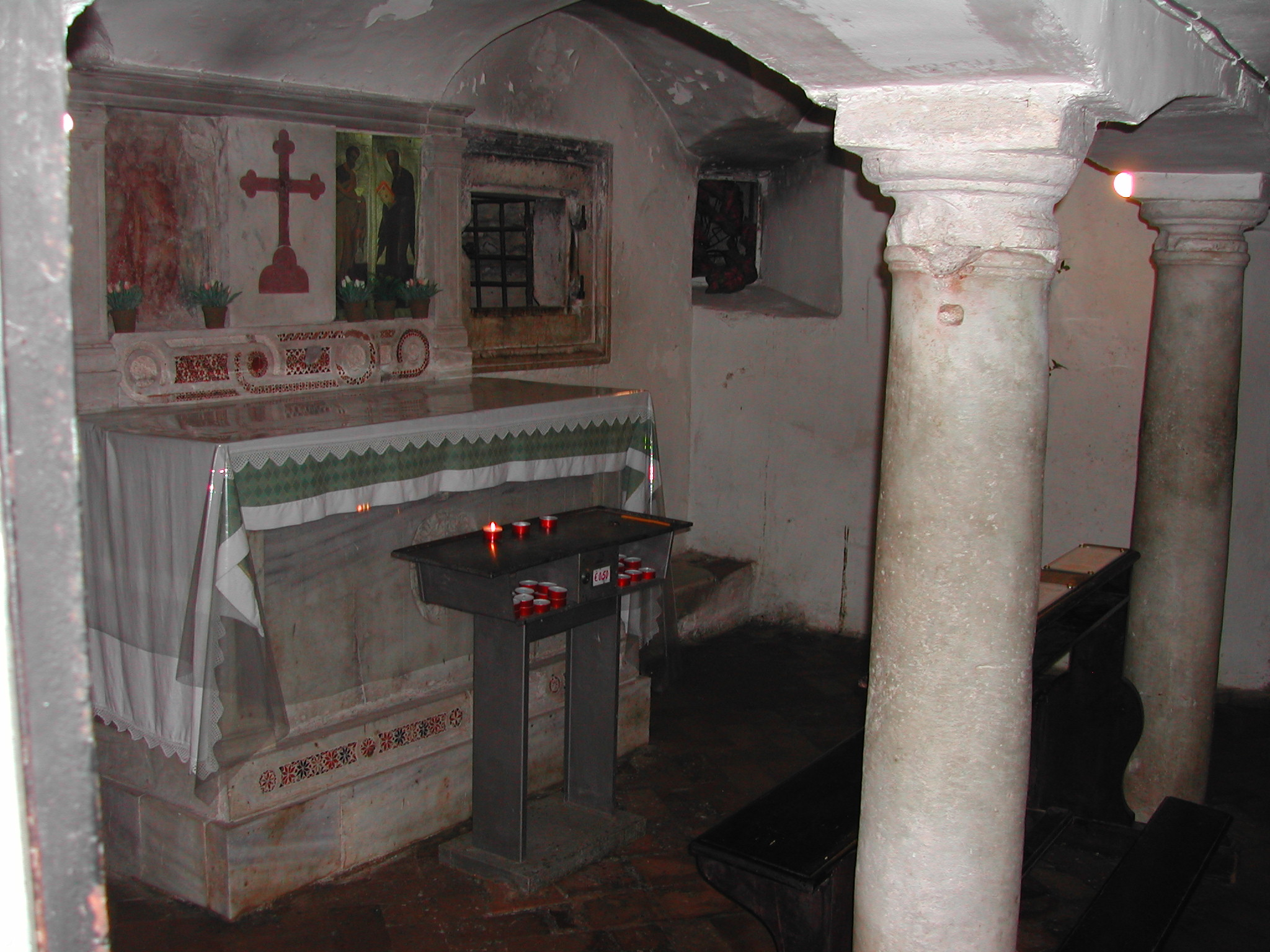 Roma, Abbazia delle Tre Fontane: Santa Maria Scala Coeli, la cripta di san Zenone